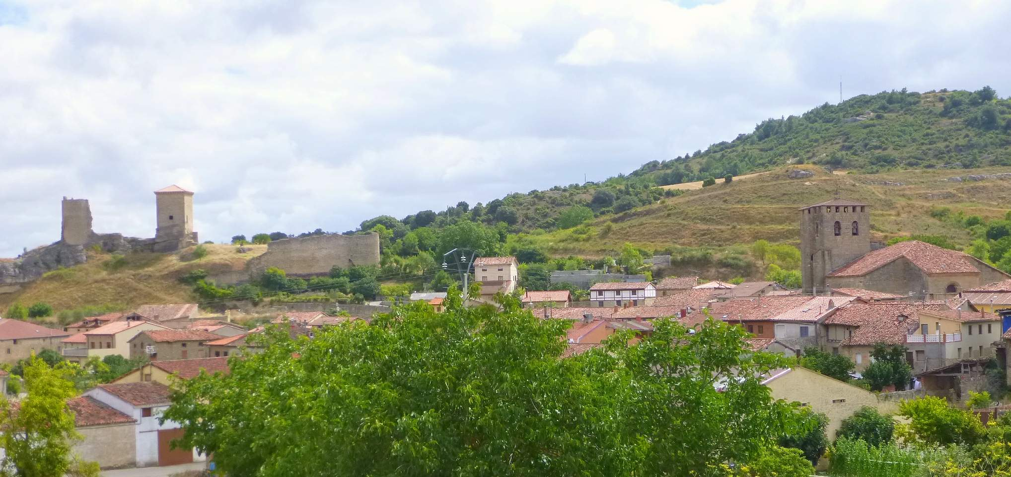 Santa Gadea del Cid (Burgos)